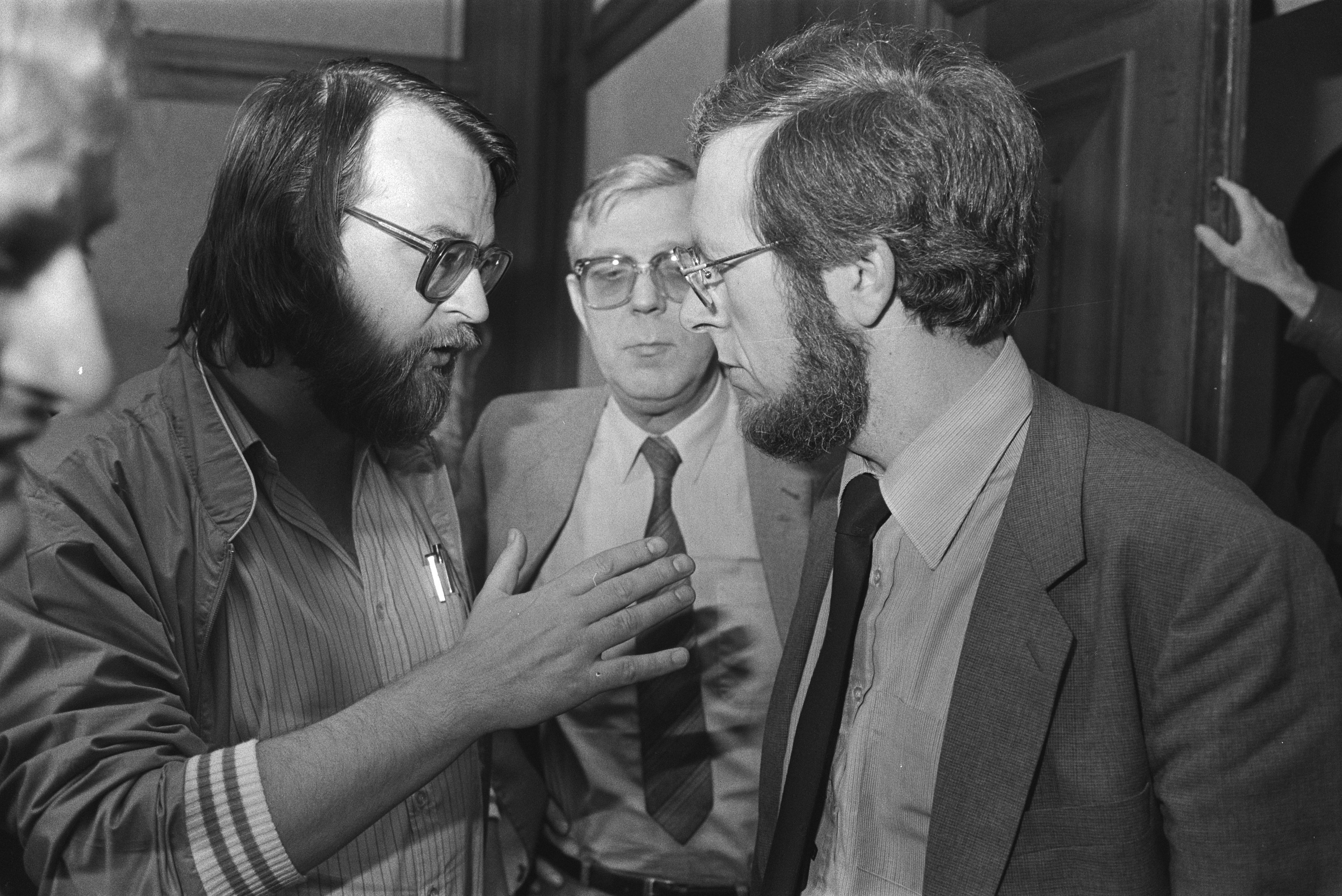 Collectie / Archief : Fotocollectie Anefo Reportage / Serie : [ onbekend ] Beschrijving : Problemen rond Wilton Fijenoord Rotterdam; FNV-onderhandelaar Dirk Nas met burgemeester Scheeres (Schiedam) en Duel Datum : 12 maart 1984 Locatie : Rotterdam, Zuid-Holland Trefwoorden : burgemeesters, industrie, onderhandelingen, scheepswerven Persoonsnaam : Duel, Nas Dirk, Scheeres Fotograaf : Antonisse, Marcel / Anefo Auteursrechthebbende : Nationaal Archief Materiaalsoort : Negatief (zwart/wit) Nummer archiefinventaris : bekijk toegang 2.24.01.05 Bestanddeelnummer : 932-8926